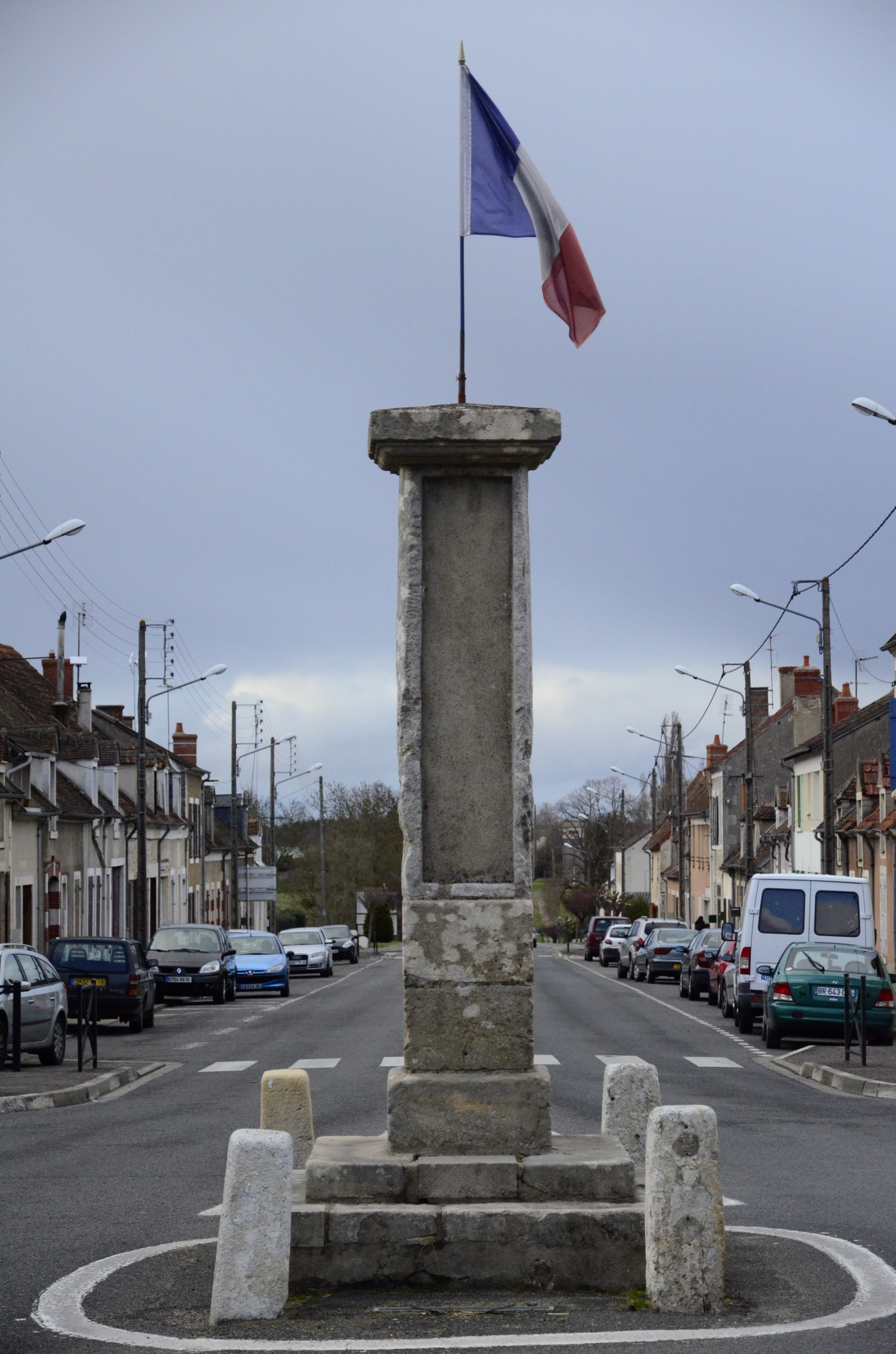 Borne indiquant l'un des "centres de la france"